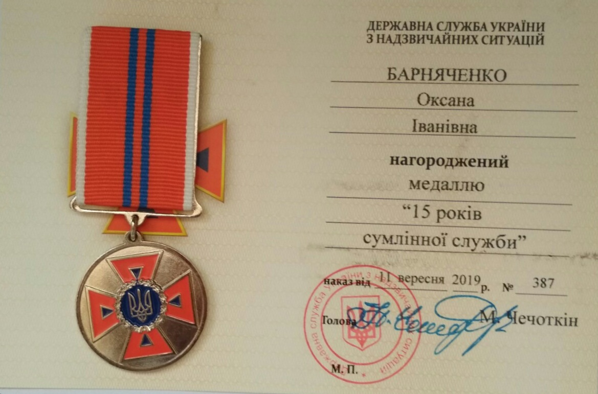 Фото Посвідчення та Медалі Державної служби України цивільного захисту "!5 років сумлінної служби", якою 11 вересня 2019 року нагороджено Барняченко Оксану Іванівну (творчий псевдонім - Оксана Радул).